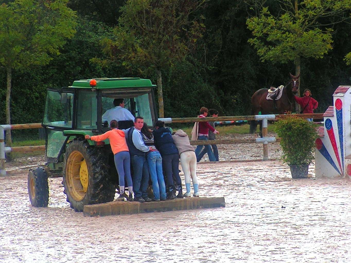 Passage de la barre sur une carrière en sable Date et lieu : Septembre 2006 à Niort (France) Auteur : Karlyne